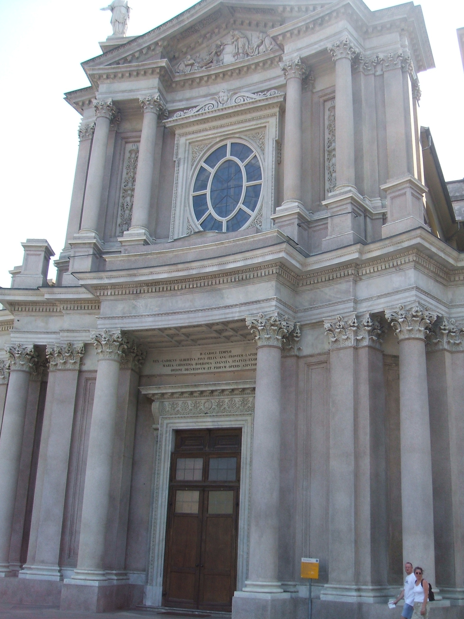 Chiesa di San Carlo Borromeo, a Torino, in Piazza San Carlo